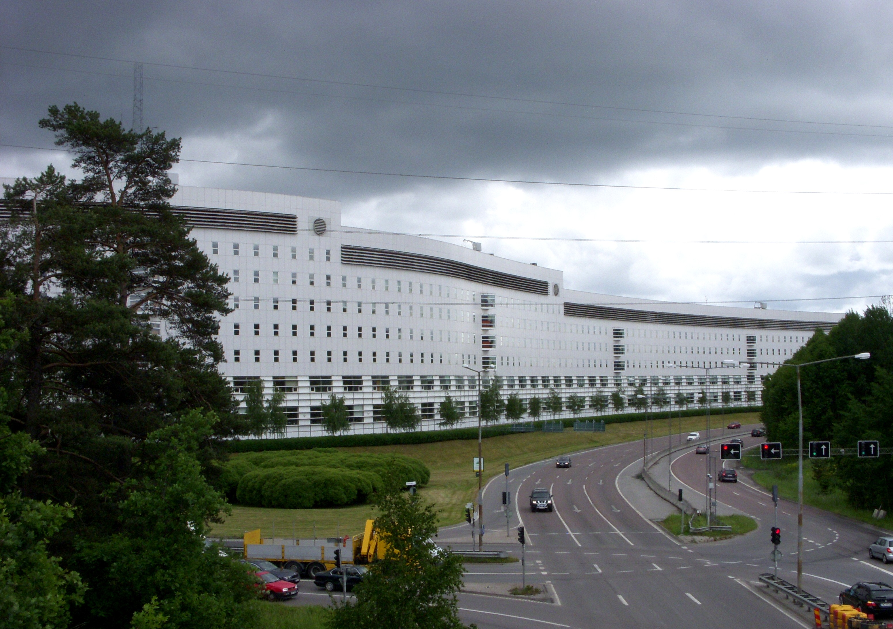 "Bankhus 90", SEB:s huvudkontor i Rissne, Sundbyberg